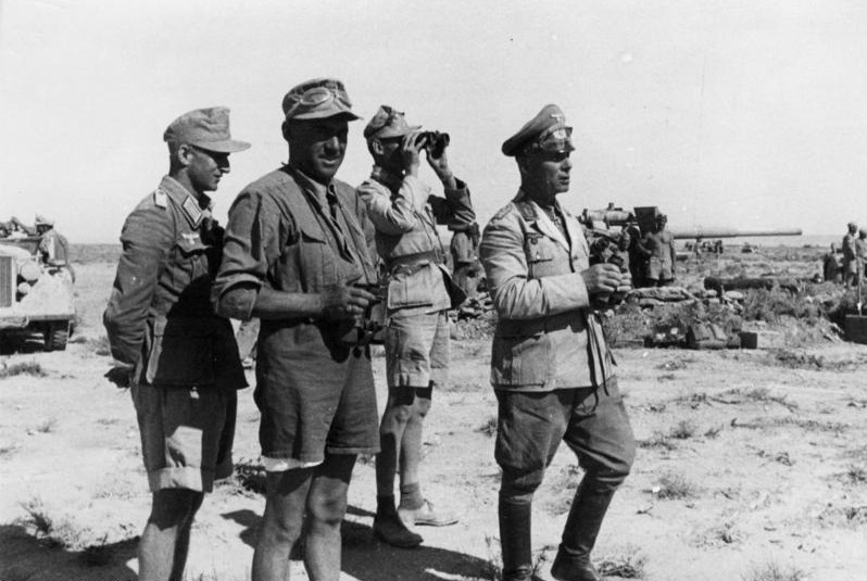 Prop.-Kp. Lw. KBK 7 Film-Nr.: 1599/25 Bildberichter: Zwilling Ort: Nordafrika Datum 18.6.42 Text: Generalfeldmarschall [Erwin] Rommel trifft in El Alamein ein, wo die letzten Besprechungen vor dem Kampf mit dem Fliegerführer Afrika stattfinden.